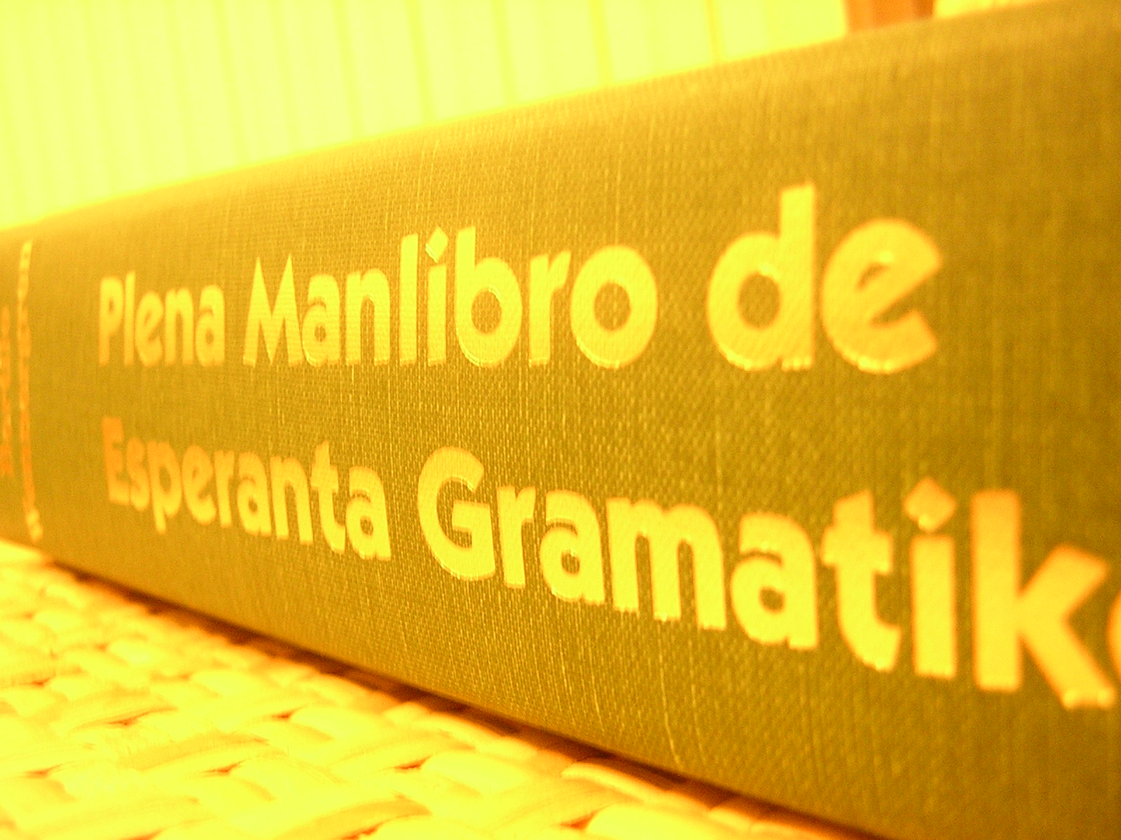 WENNERGREN, Bertilo. Plena Manlibro de Esperanta Gramatiko. 1-a eldono. El Cerrito: ELNA, 2005. 696 pĝ. ISBN 0939785072.